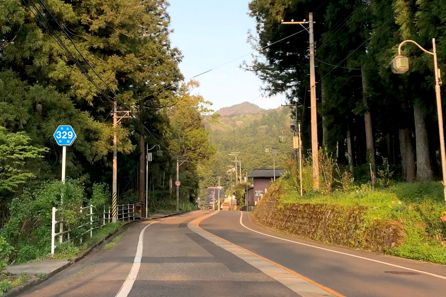 新潟県道329号五頭連峰公園線 奥が出湯温泉となる（2020年5月）